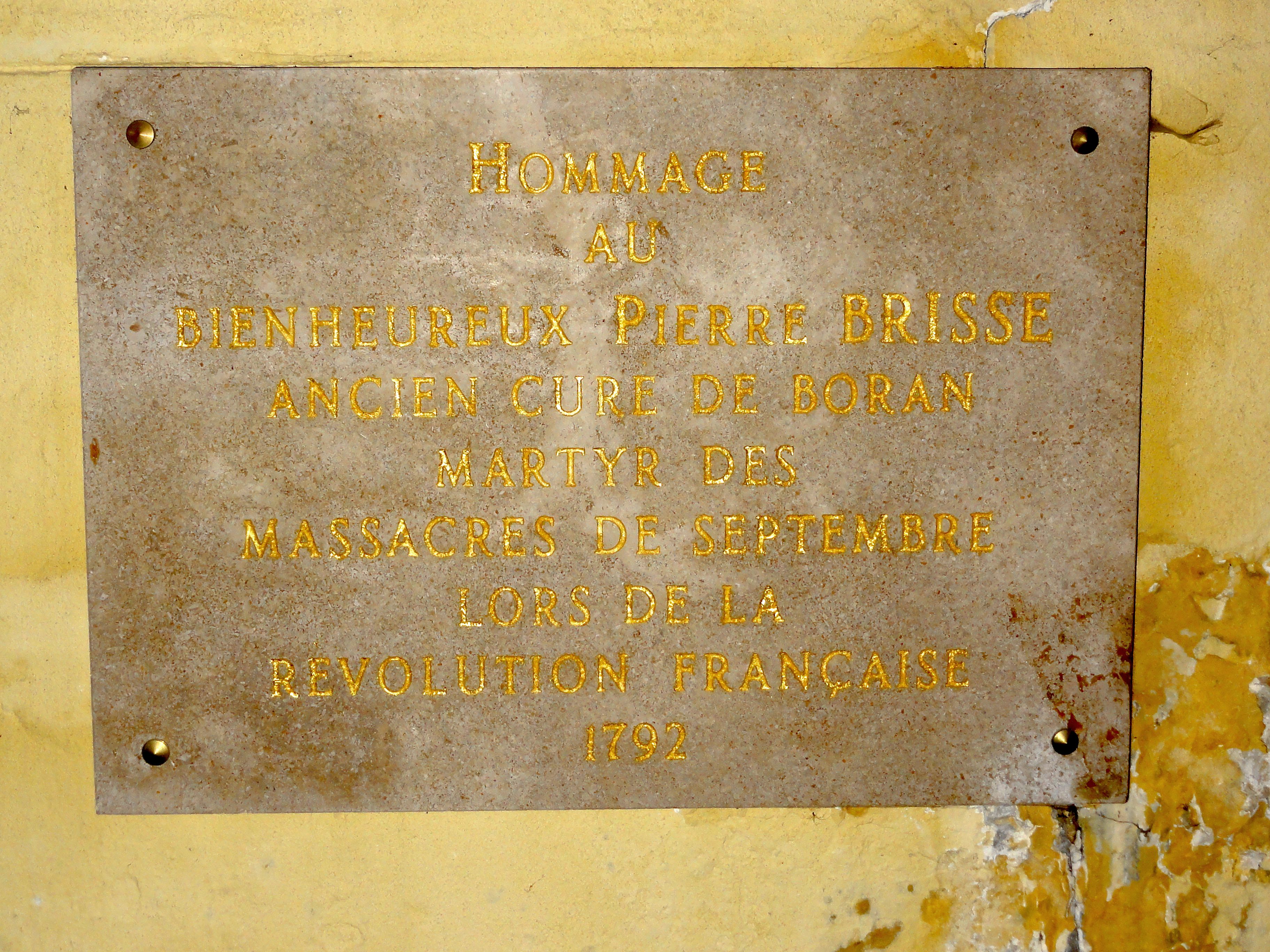 Plaque commémorative pour le bhx Pierre Brisse, ancien curé de Boran, martyr de la Révolution.